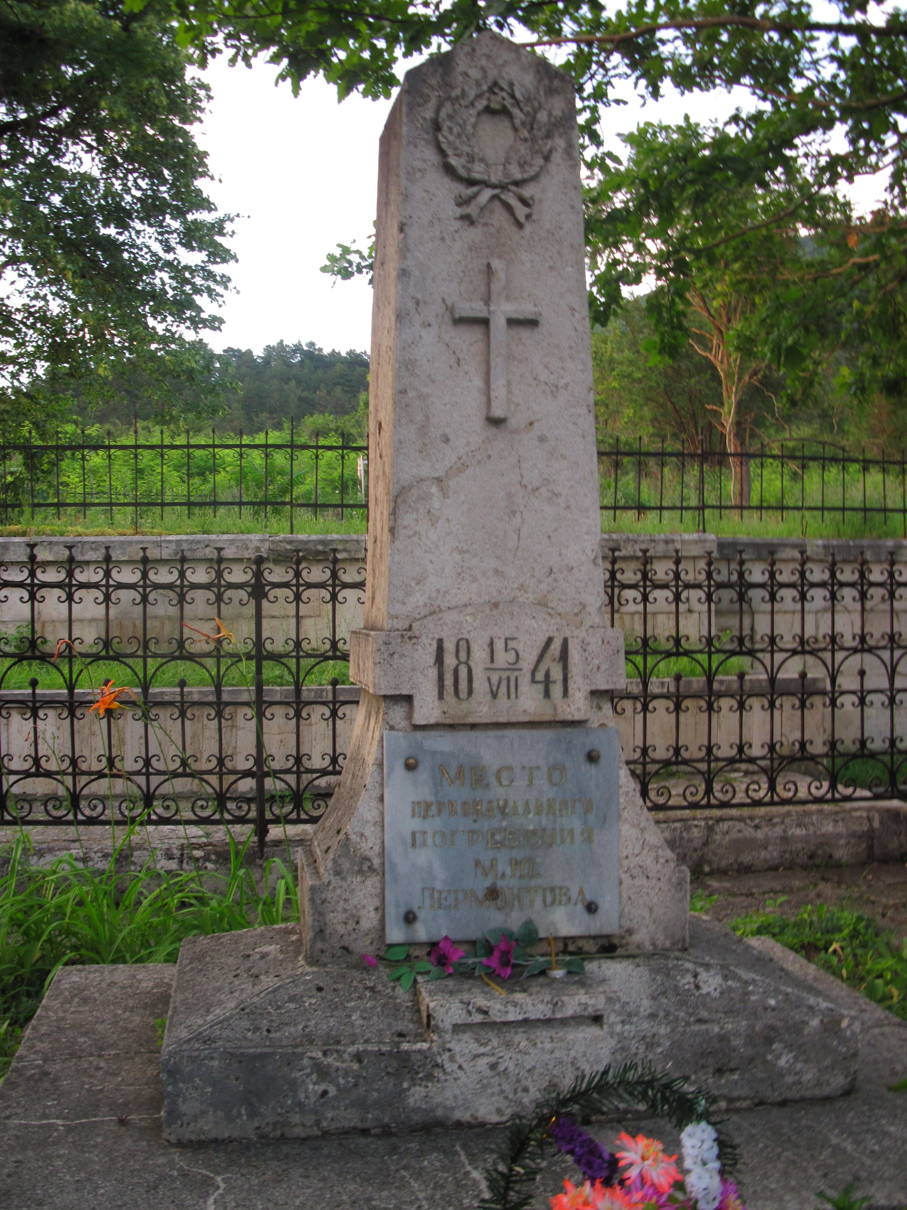 Первоначальное место захоронения Лермонтова